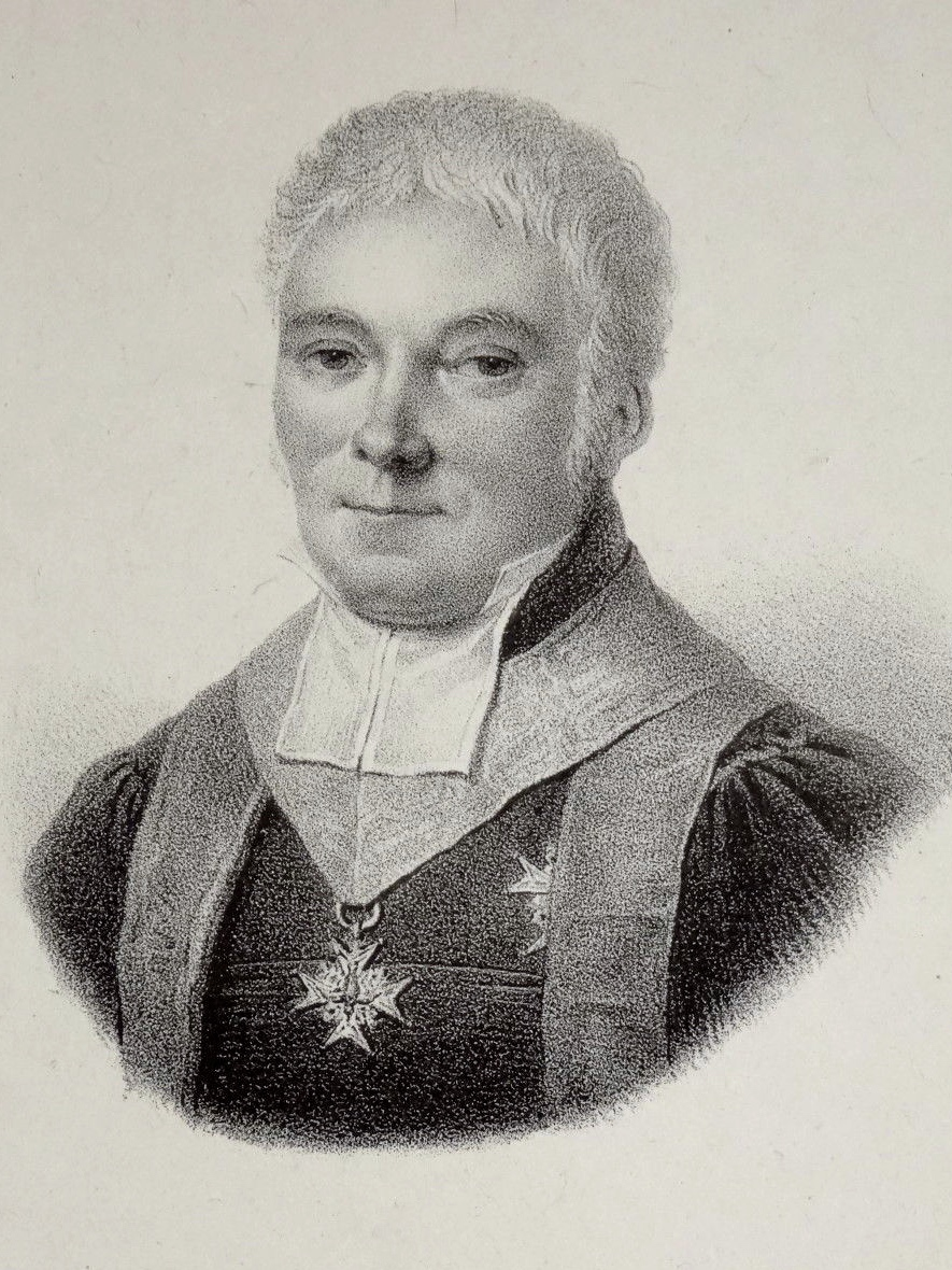 Gravure du chancelier Dambray